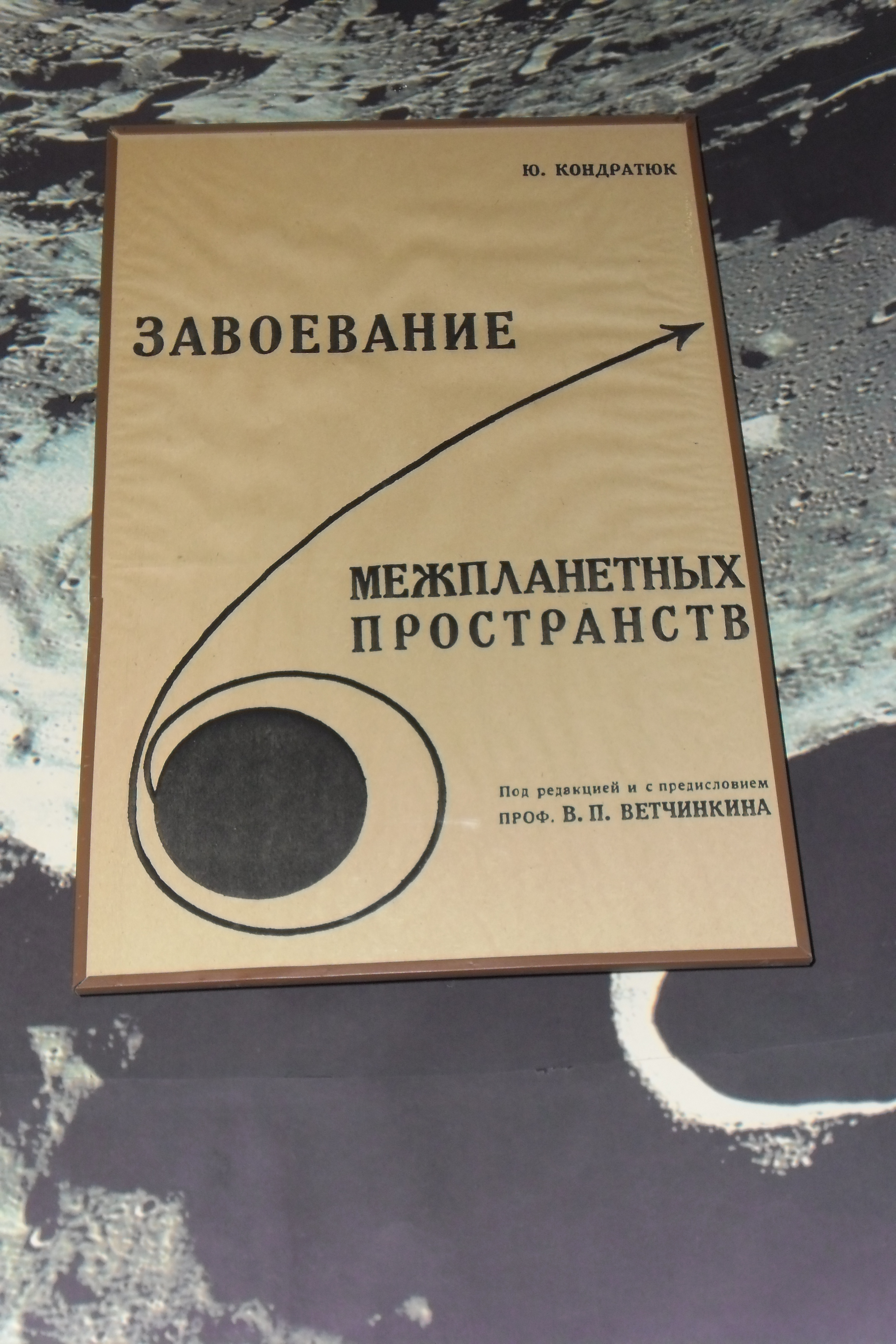 Фото